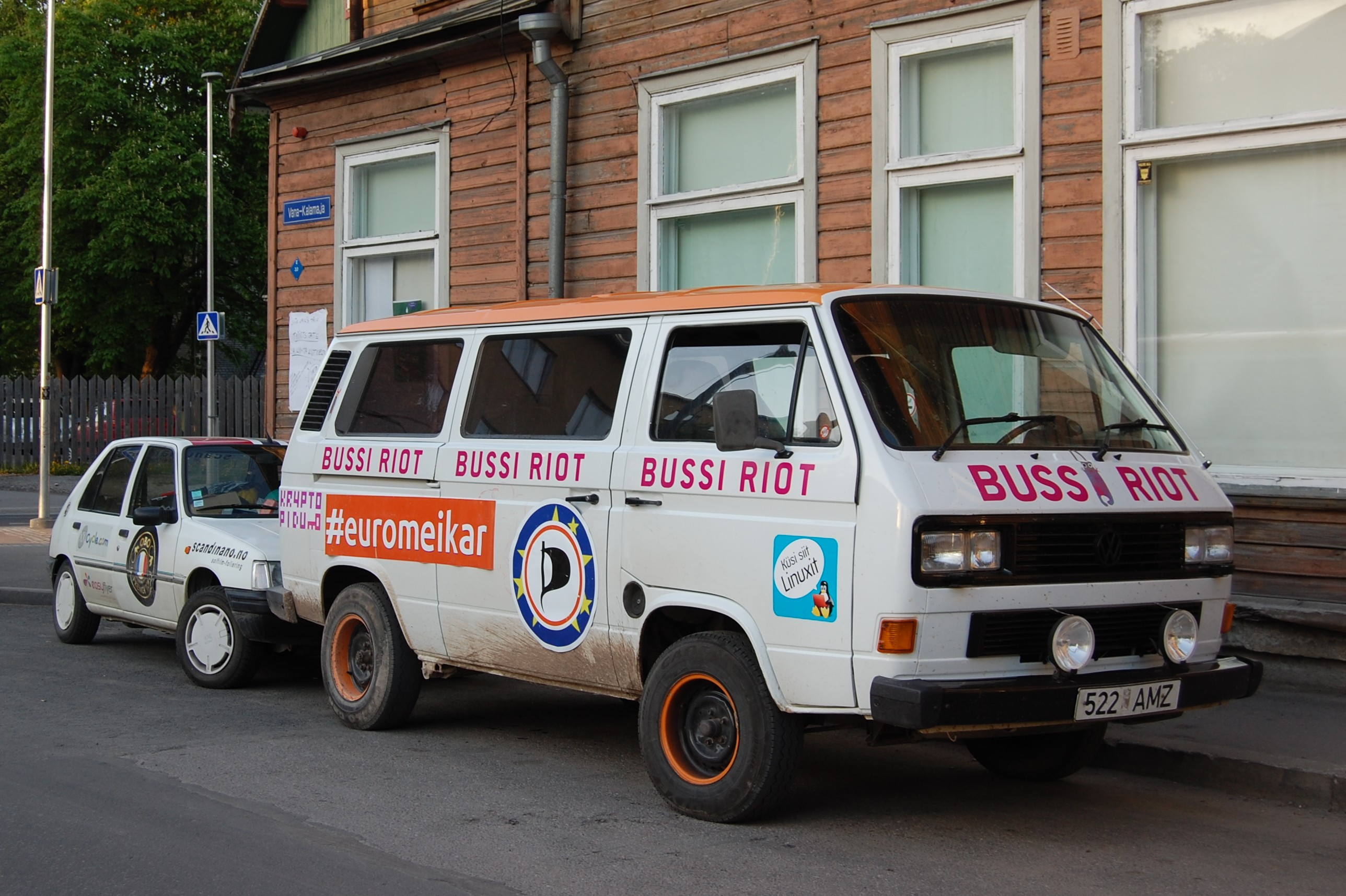 Silver Meikari "Bussi riot" eurovalimiste kampaania Tallinnas, Kalamajas